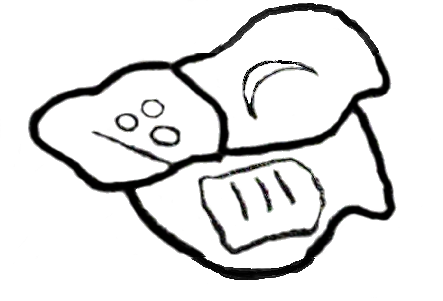 Mapa que Tahei debuxa no chan para explicarlle a Rokurōta o plan que concibiu con Matashichi para chegar desde Akizuki a Hayakawa pasando por Yamana.